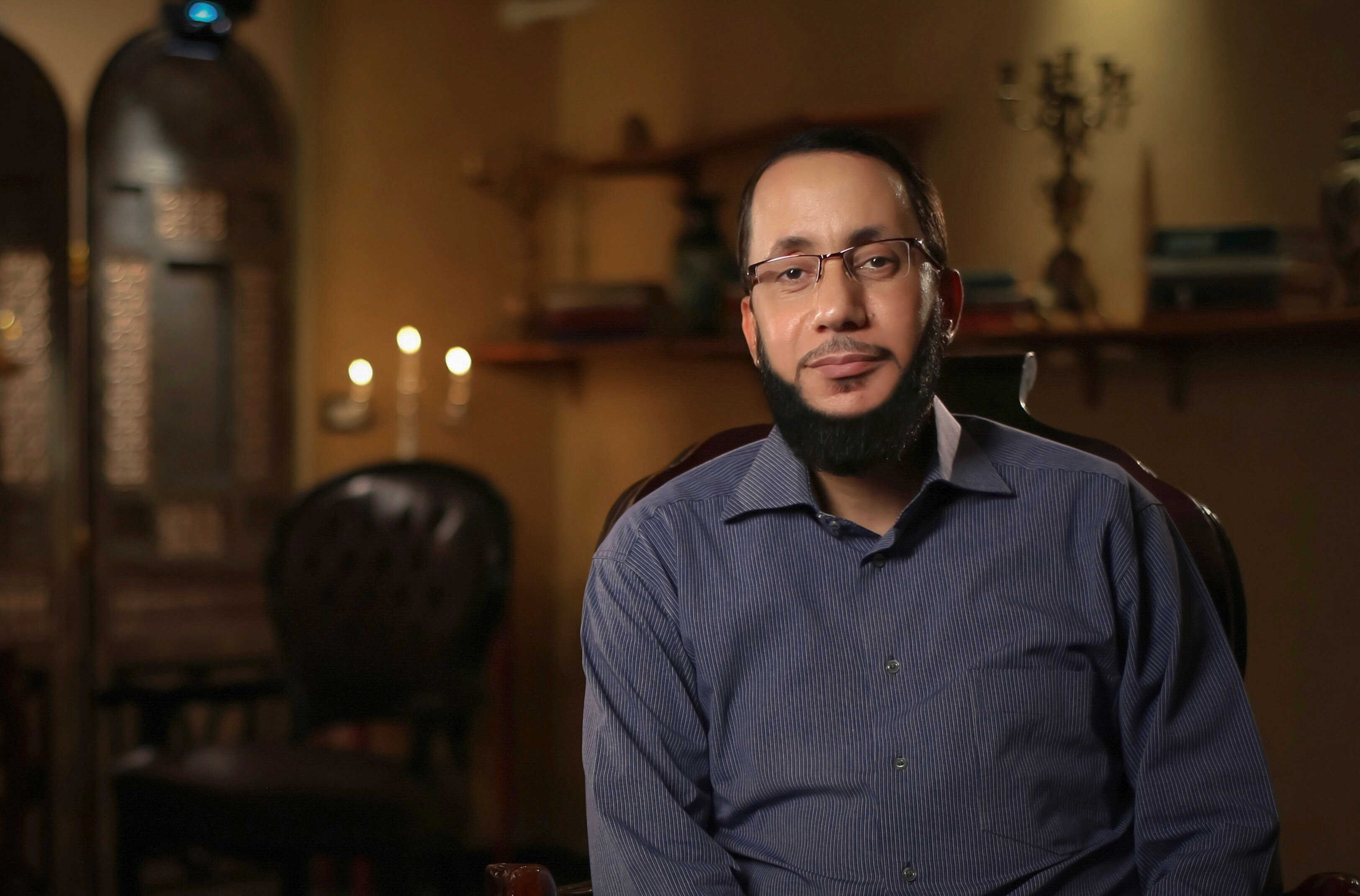 Hasan A Qatamish